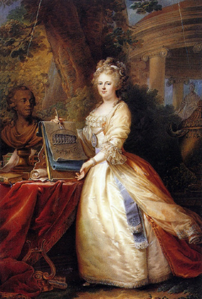 Johann Baptist Lampi der Ältere (1751–1830): Großfürstin Maria Fjodorowna (Sophia Dorothea von Württemberg, 1759–1828), Gattin des künftigen Kaisers Paul I., 1795 (Museum Schloss Pawlowsk).